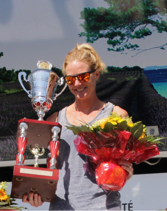 Carrie Lester vainqueur Embrunman 2016